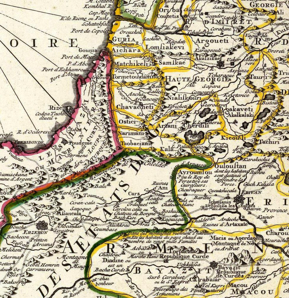 Carte des Pays voisins de la Mer Caspiene, dressee pour l'usage du Roy. Sur la carte de cete Mer, faite par l'ordre du Czar, sur les Memoires manuscrits de Soskam-Sabbas, Prince de Georgie, sur ceux de Mrs. Crusius, Zurabek, et Fabritius Ambassadeurs a la Cour de Perse, et sur les eclaircissemens tirez d'un grand nombre de persones intelligentes du pais. Assujetie aux observations astronomiques. Par G. Delisle, Geog. de l'Acad. Roy. des Scien. A Amsterdam, Chez Jean Covens et Corneille Mortier, Geographes. (1742)